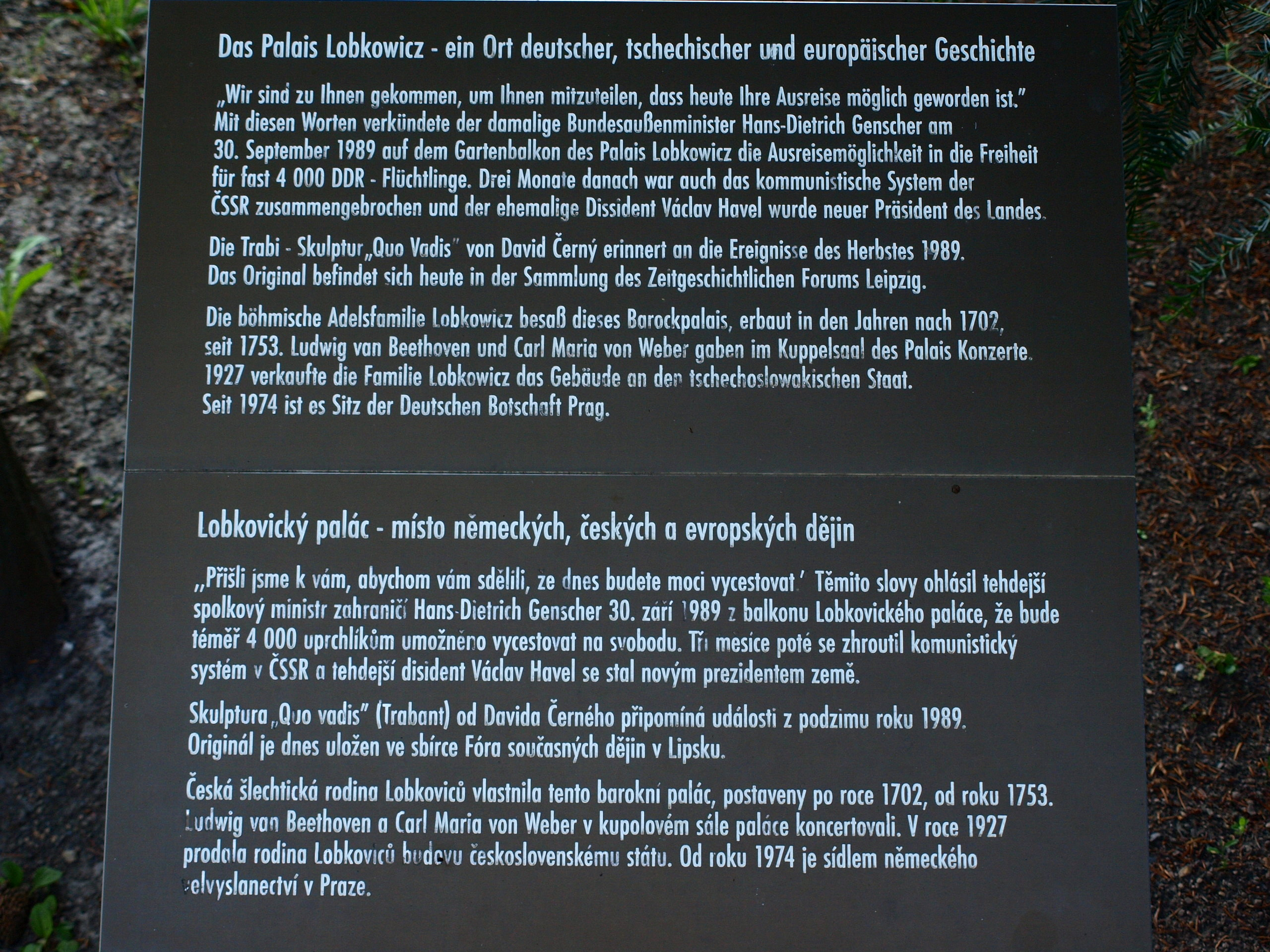 Lobkovický palác Malá Strana